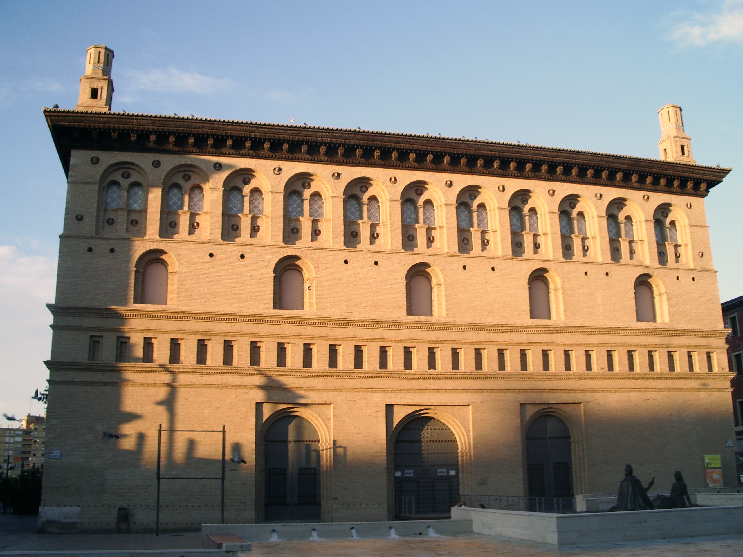 La Lonja de Zaragoza